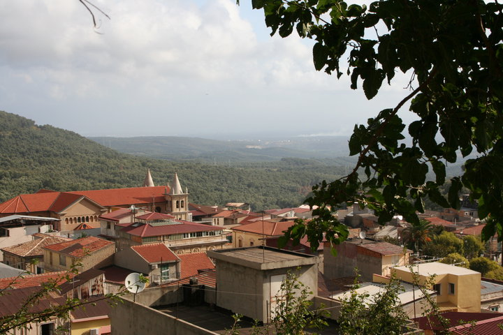 panorama